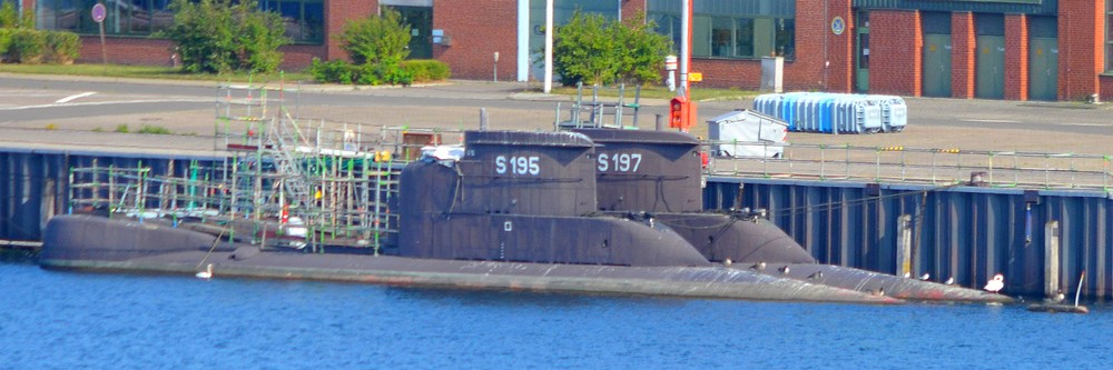 Sous-Marins S195 (U16) et S197 (U18) au Port de Kiel le 22.08.2018